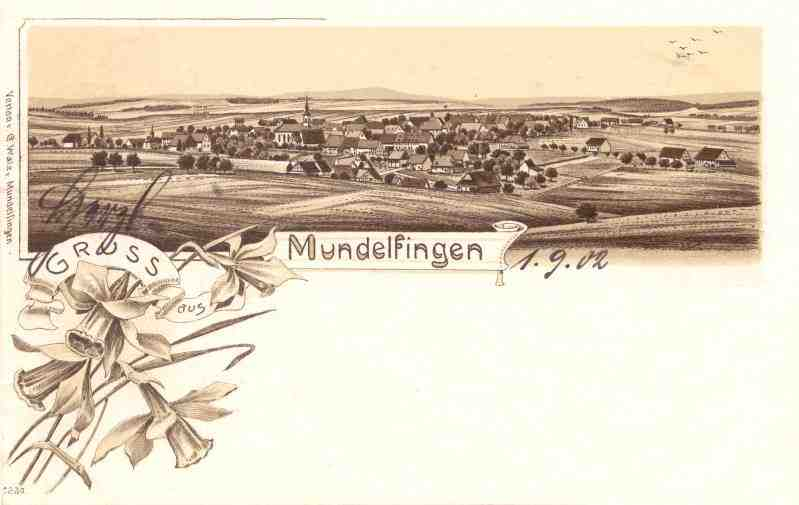 È aalti Poschtkartè vo 1902 für s Dorf Mulifingè.